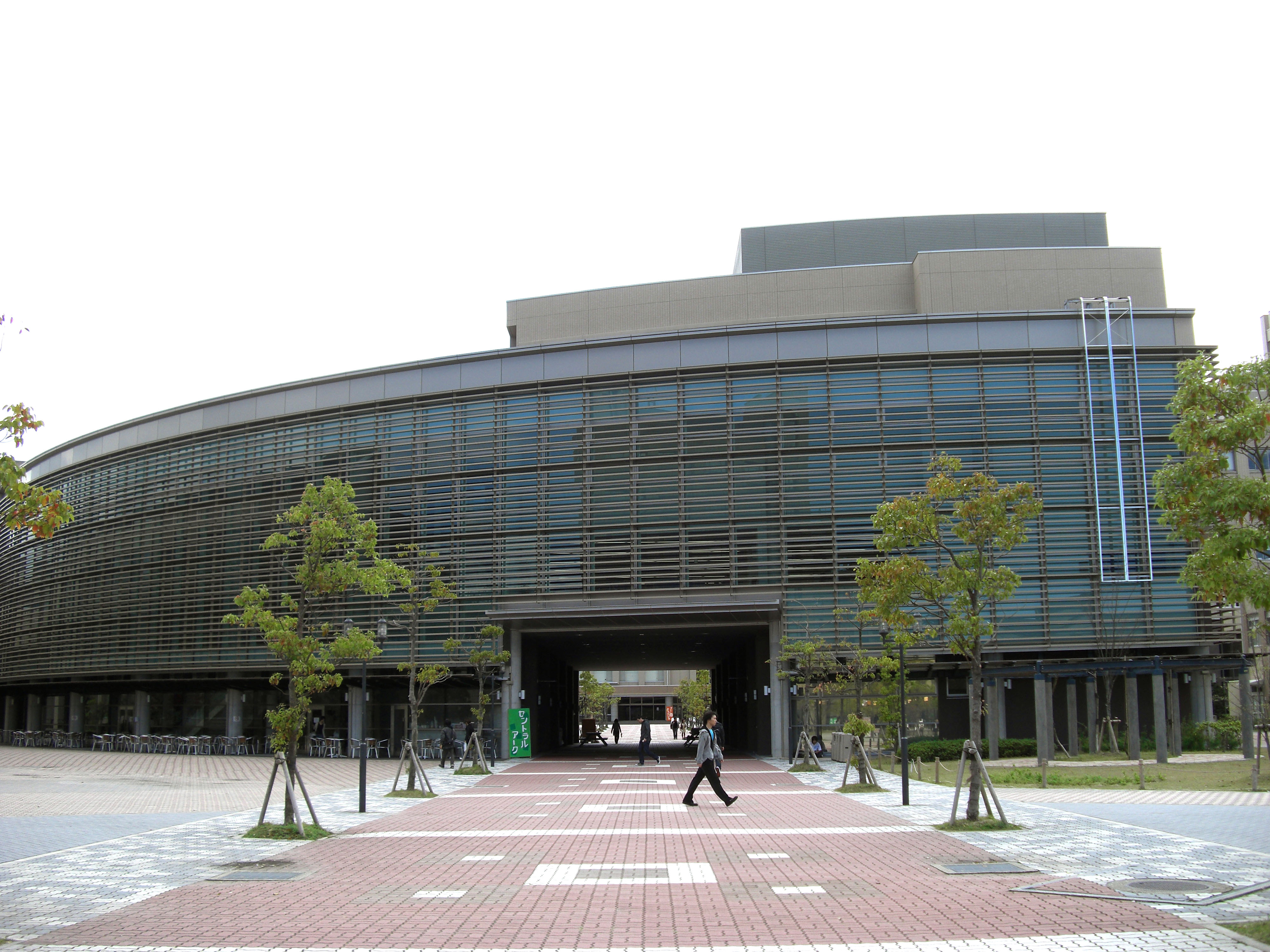 CENTRAL ARC,1-1-1 Nojihigashi Kusatsu-City Shiga JAPAN.